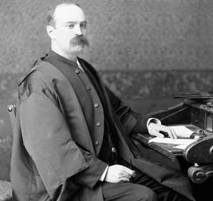 François Fortunat Rouleau, Advocate, House of Commons.